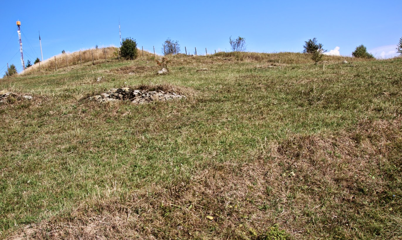 Cetatea Jigodin I